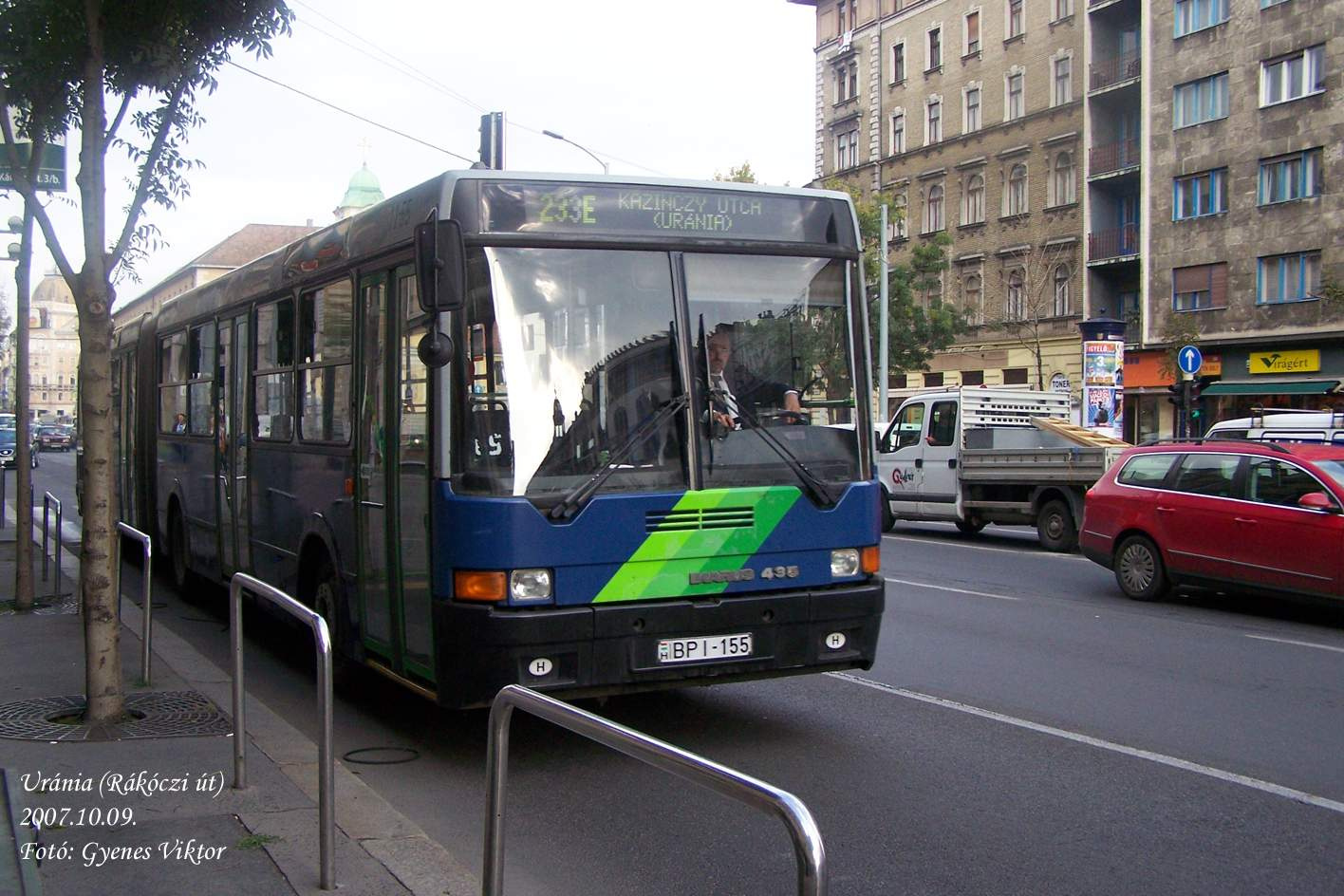 Ikarus 435-ös busz a 233E vonalon az Urániánál